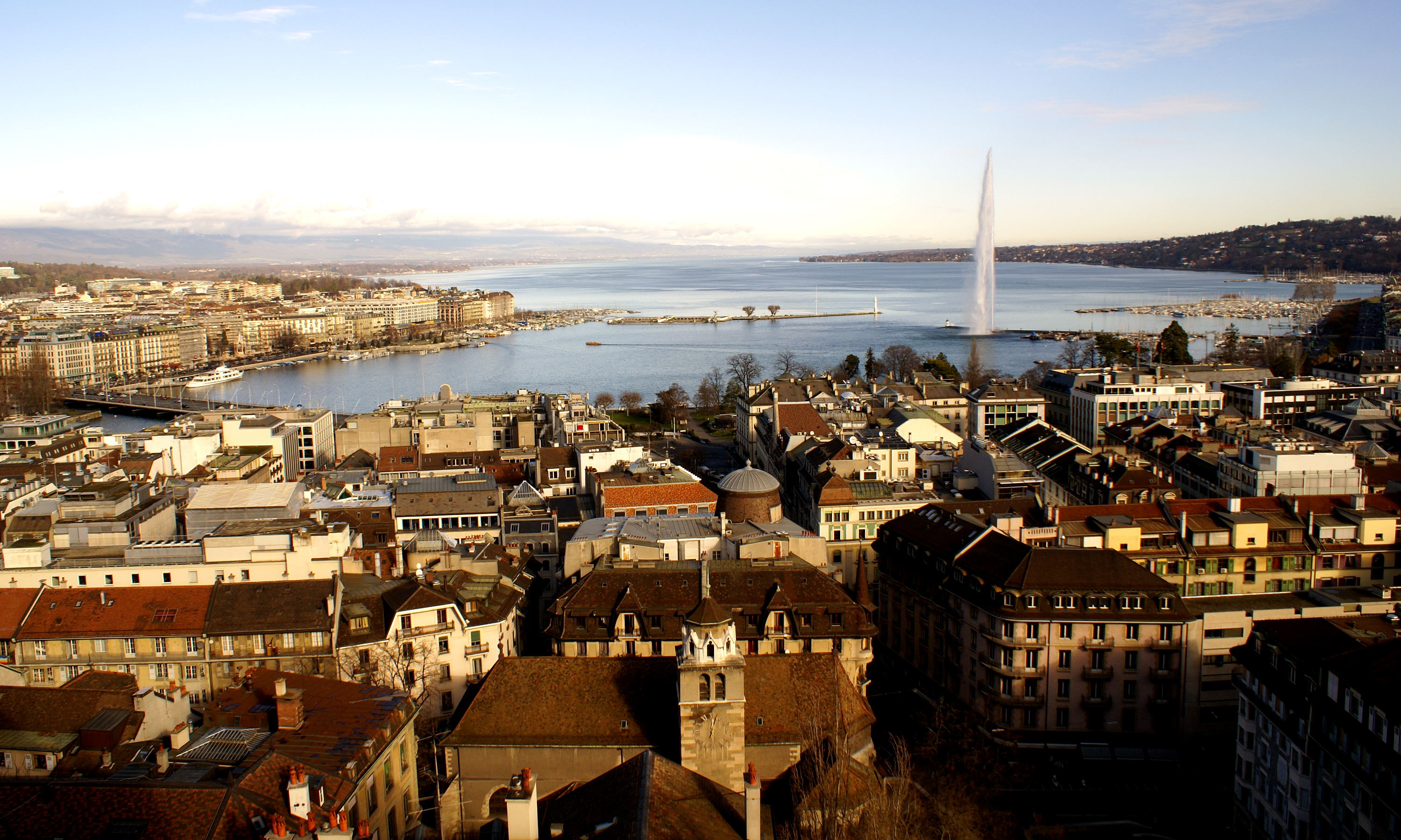 Blick auf Genf von der Kathedrale St. Peter